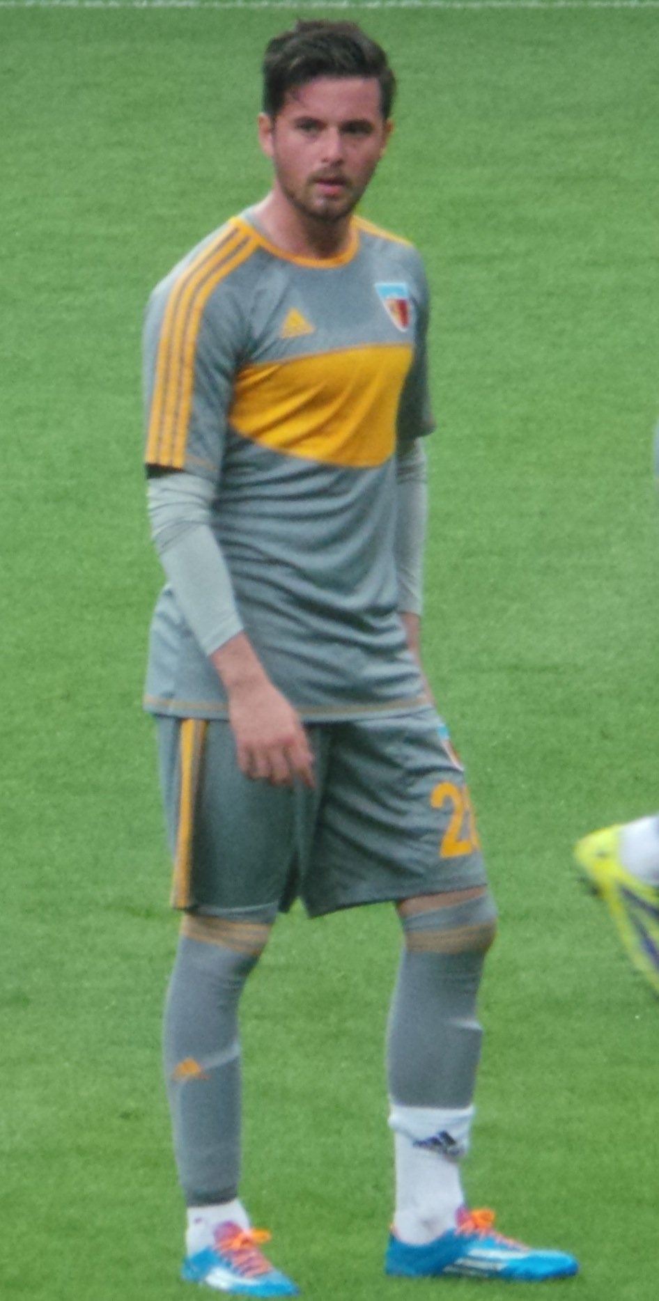 Engin Bekdemir